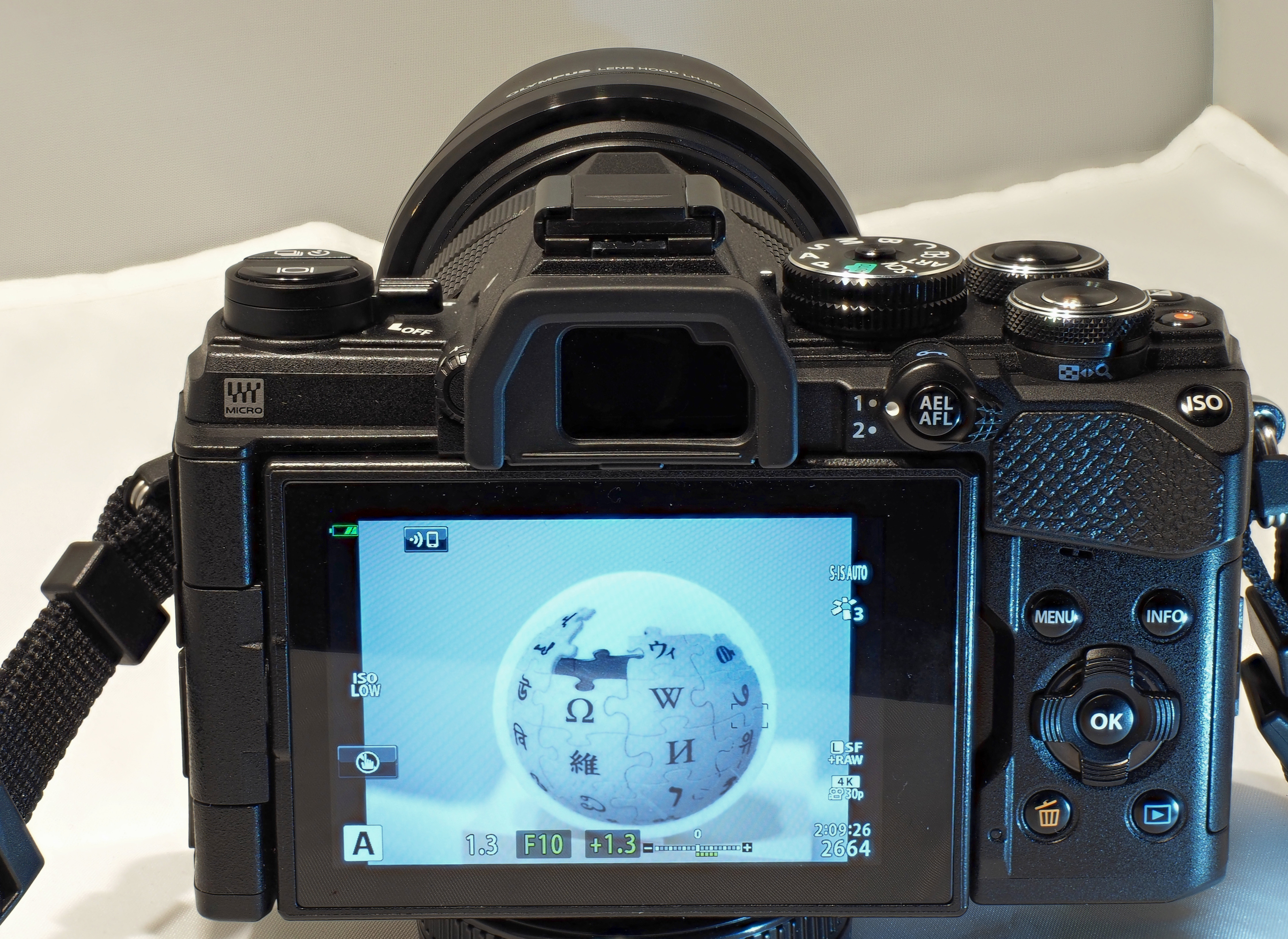 Olympus Systemkamera OM-D E-M5 Mark III, von der Kamerarückseite aus gesehen